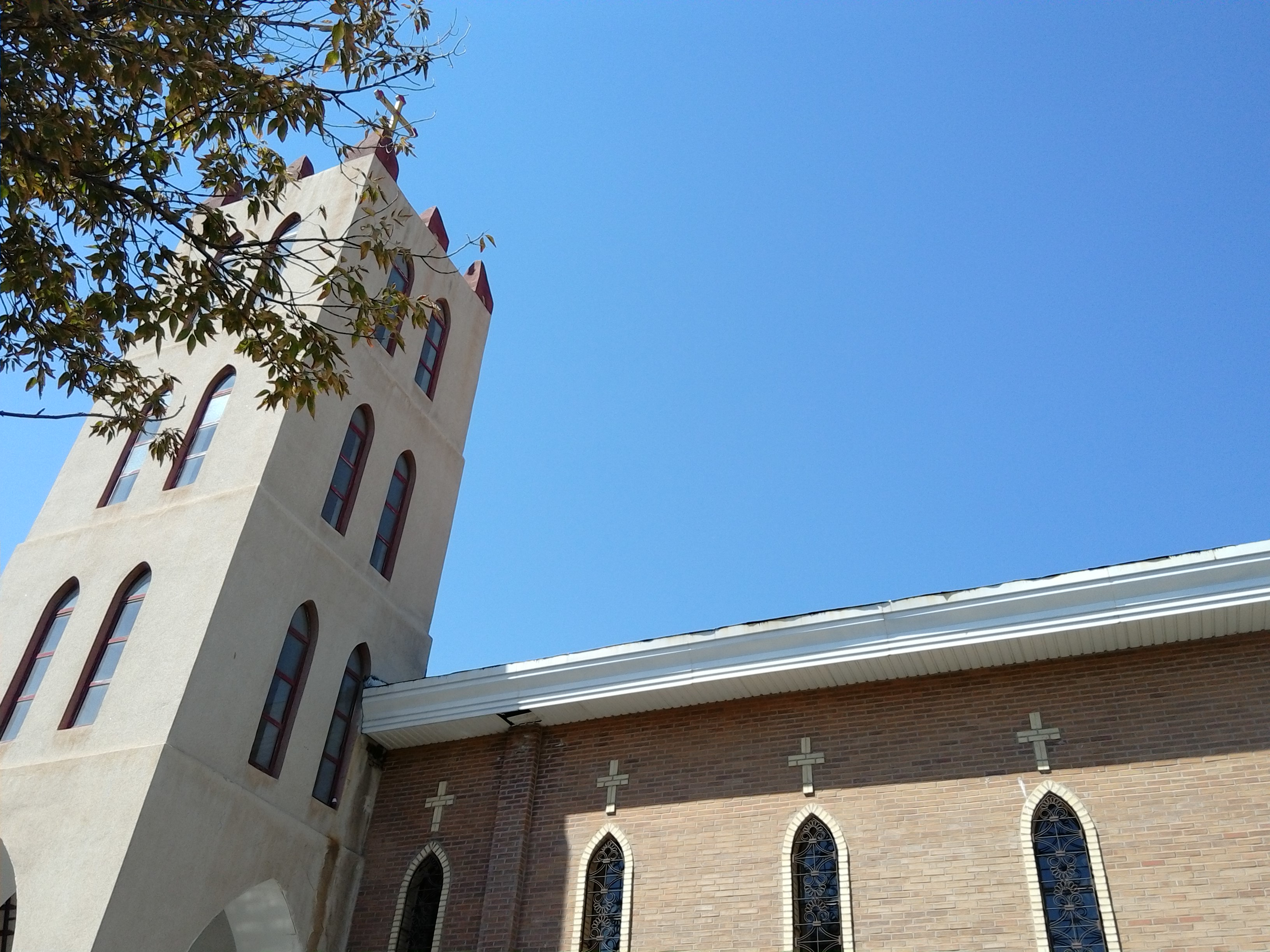 کلیسای مریم مقدس (اروميه)